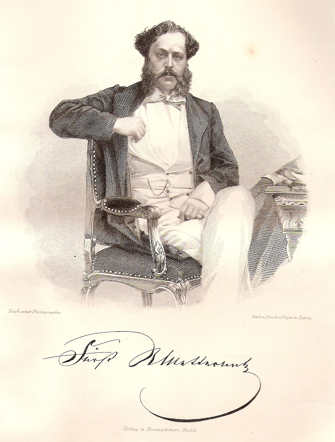 Stahlstich von Fürst Richard Klemens von Metternich in der Allgemeine Moden-Zeitung (1863), Kalenderwoche 47